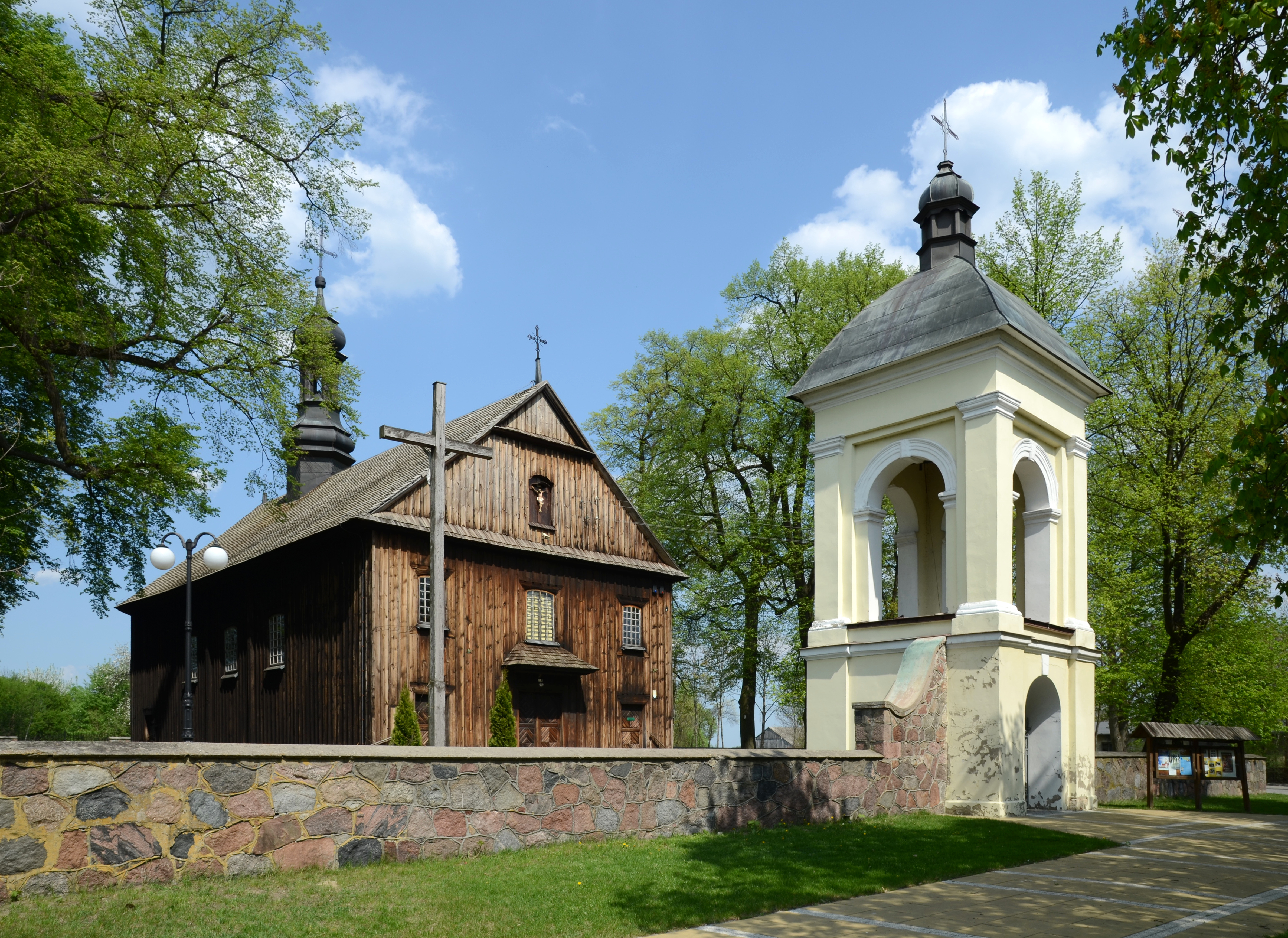 Wodynie - kościół parafialny p.w. śś. Piotra i Pawła (drewn., 1776)